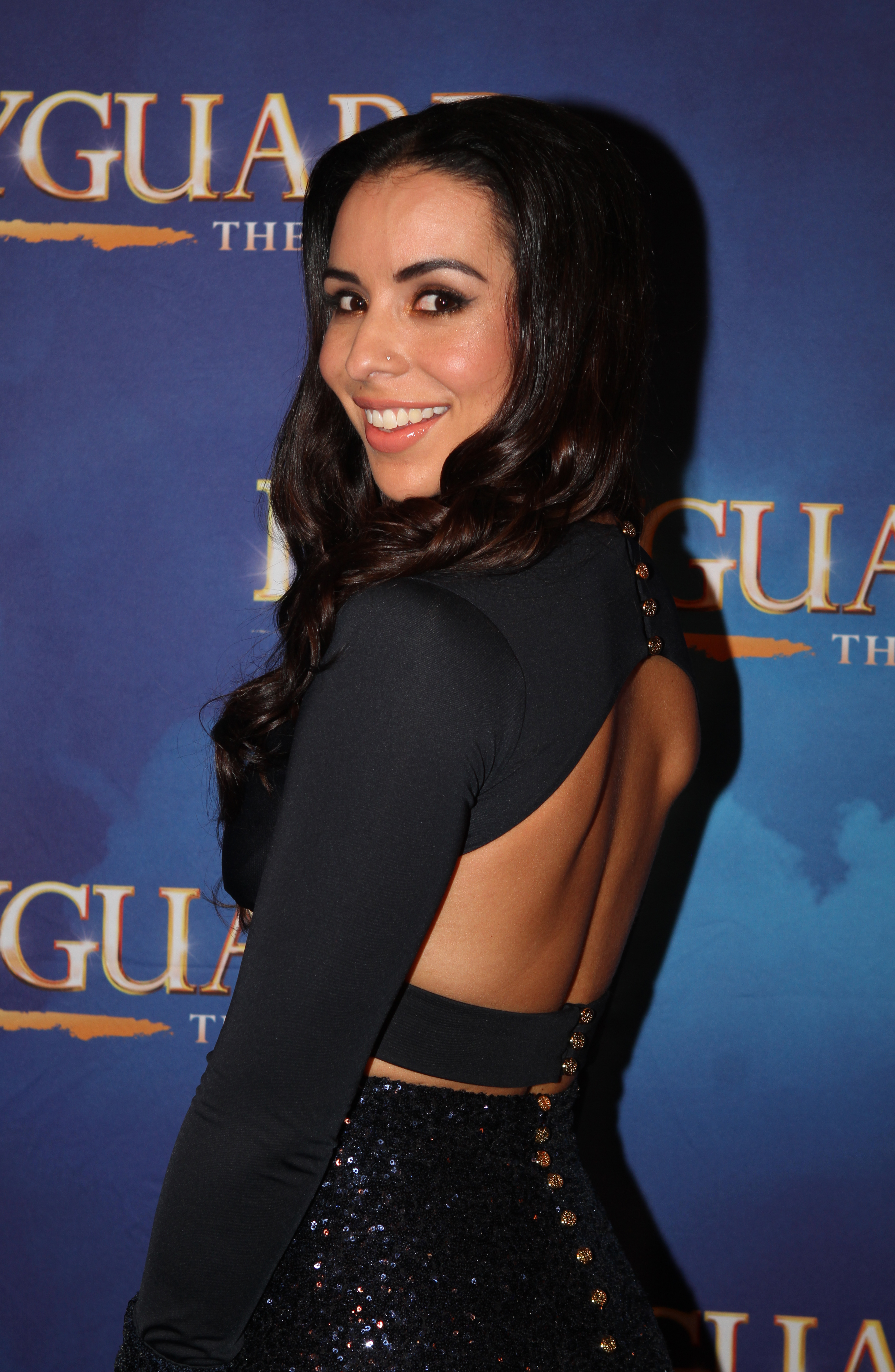 Kat Hoyos à la première de The Bodyguard The Musical Sydney